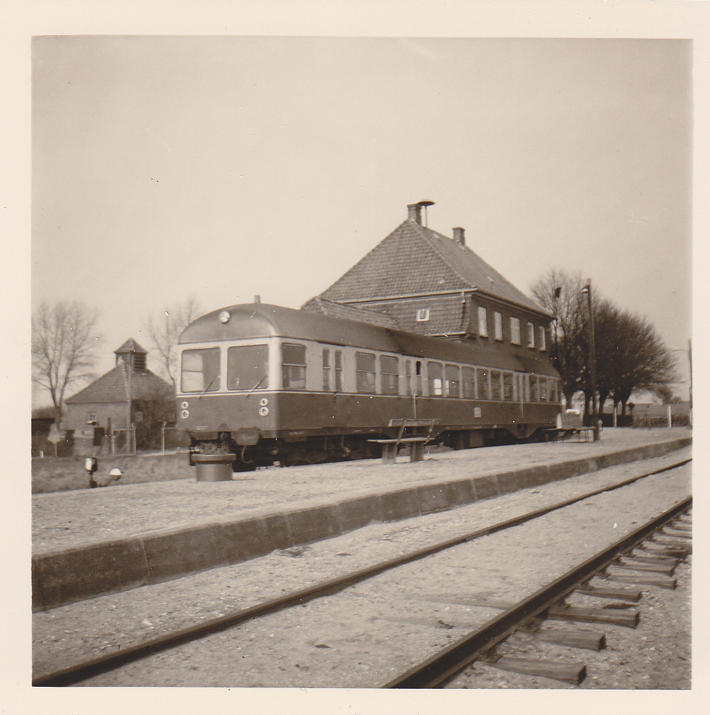 Bahnhof Schönberger Strand mit einem MaK GDT der Kiel-Schönberger Eisenbahn